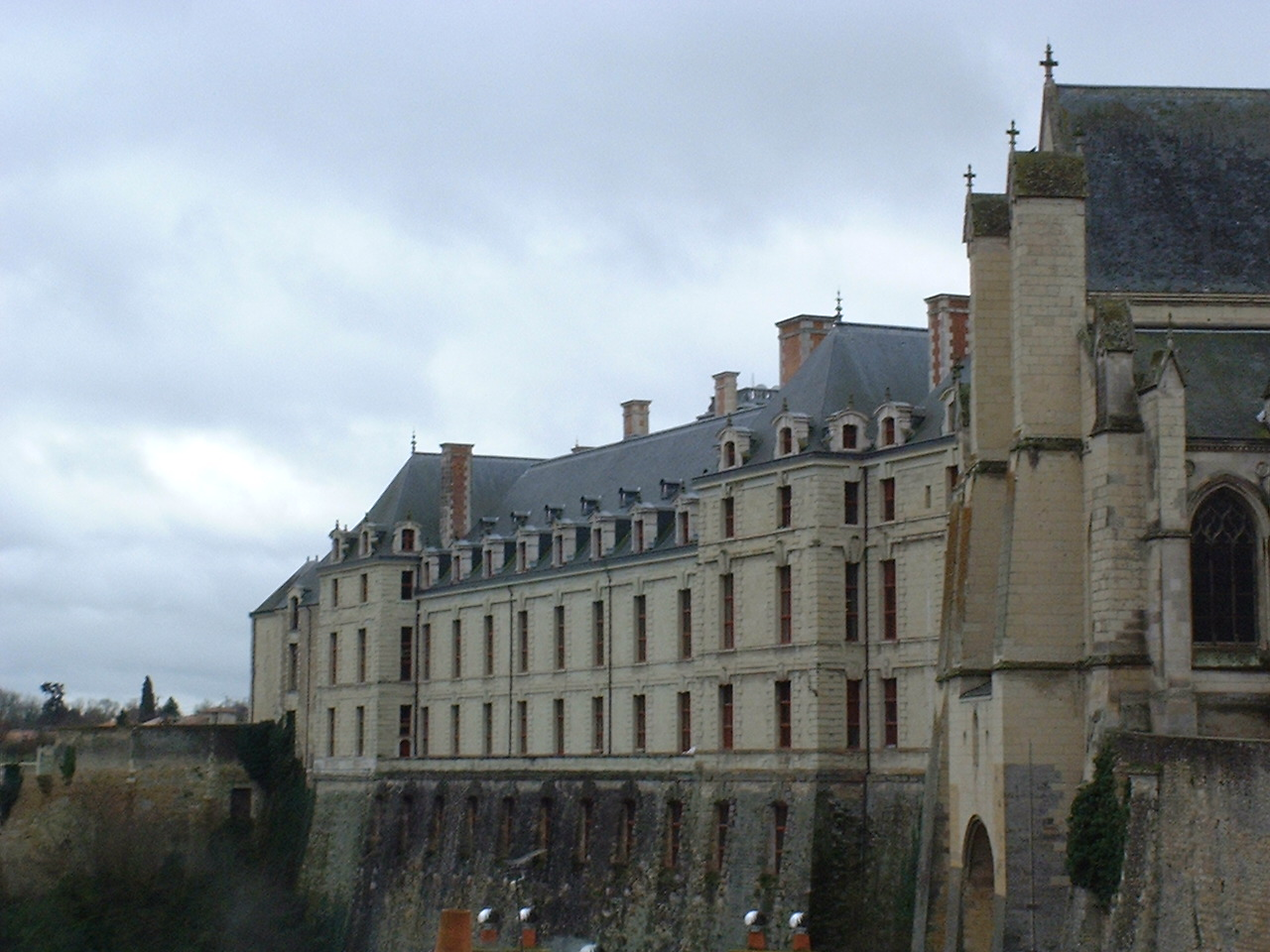 Château de la Tremoïlle, Thouars, France. Le château, surplombant la rivière. Sur la droite, une partie de la chapelle du château.